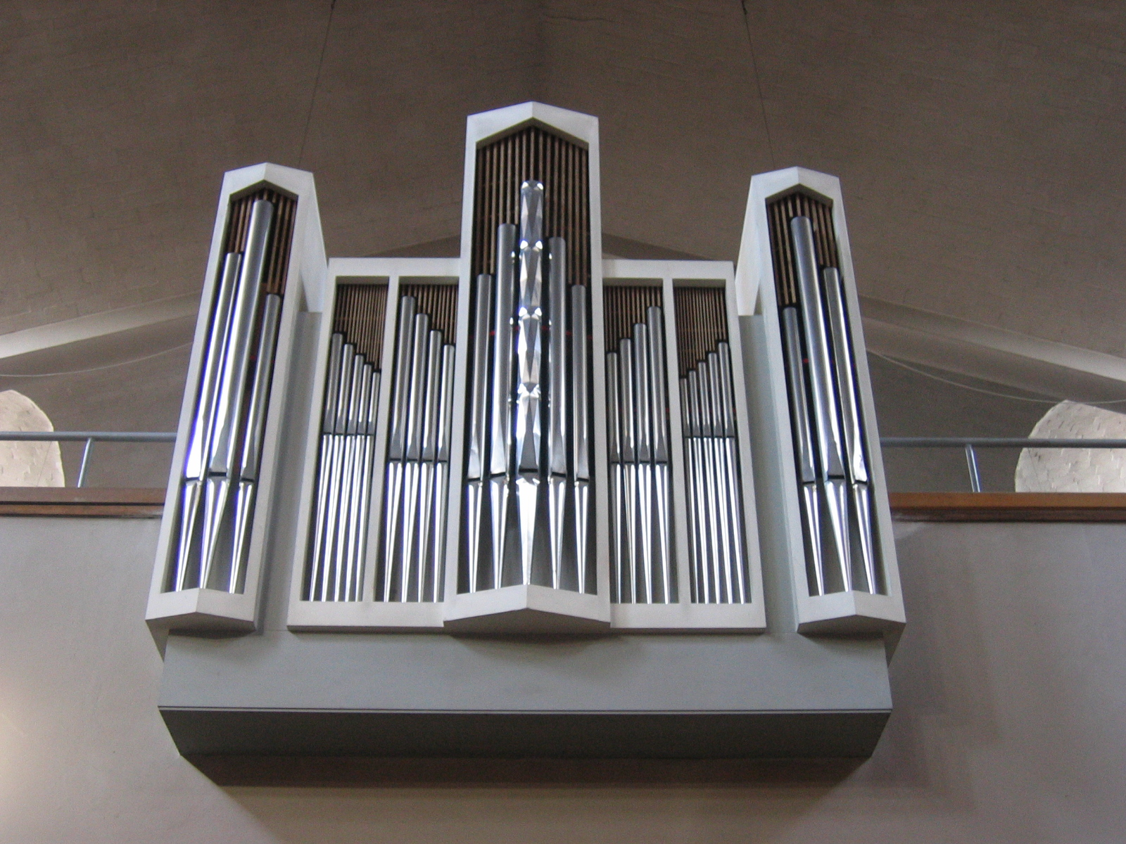 Rückpositiv der Orgel der Paul-Gerhardt-Kirche in München.